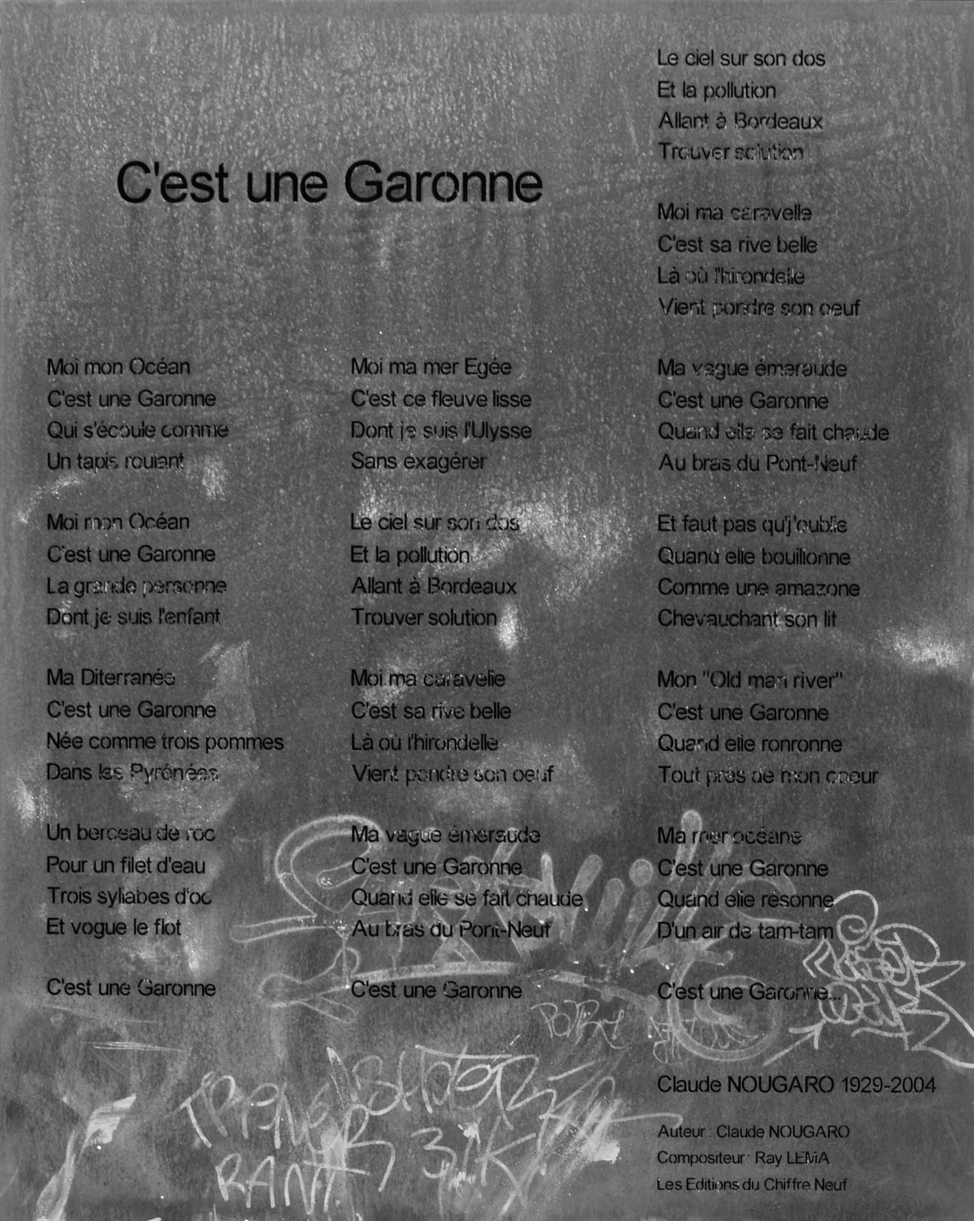 Une plaque sur laquelle est inscrit le poème "C'est une garonne" de Claude Nougaro